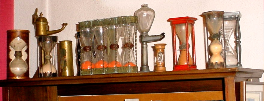 Sammlung von Sanduhren im Jünger Haus in Wilflingen, Kreis Biberach. Die dritte Sanduhr von rechts (rot) stammt aus einem Mailänder Bordell. Mit Genehmigung von Weberberg.de, Website für Biberach veröffentlicht.